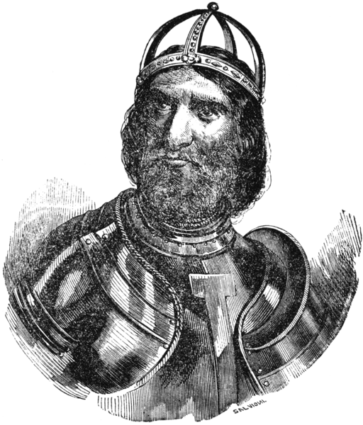 L'imperatore Federico Barbarossa. Maria Maddalena Incisione su acciaio firmata "Scalvioni".